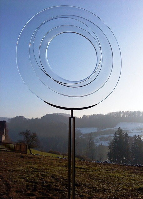 Glas-Skulptur von Livio Seguso, "Movemento", in der Kunstsammlung Landstieg